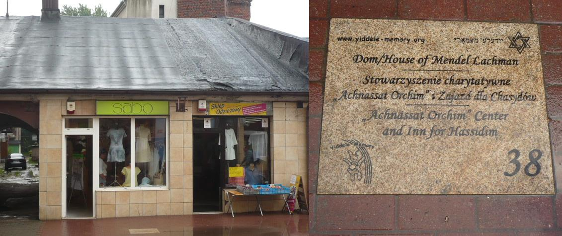 Radomsko. Otwarte Muzeum Żydowskie 38